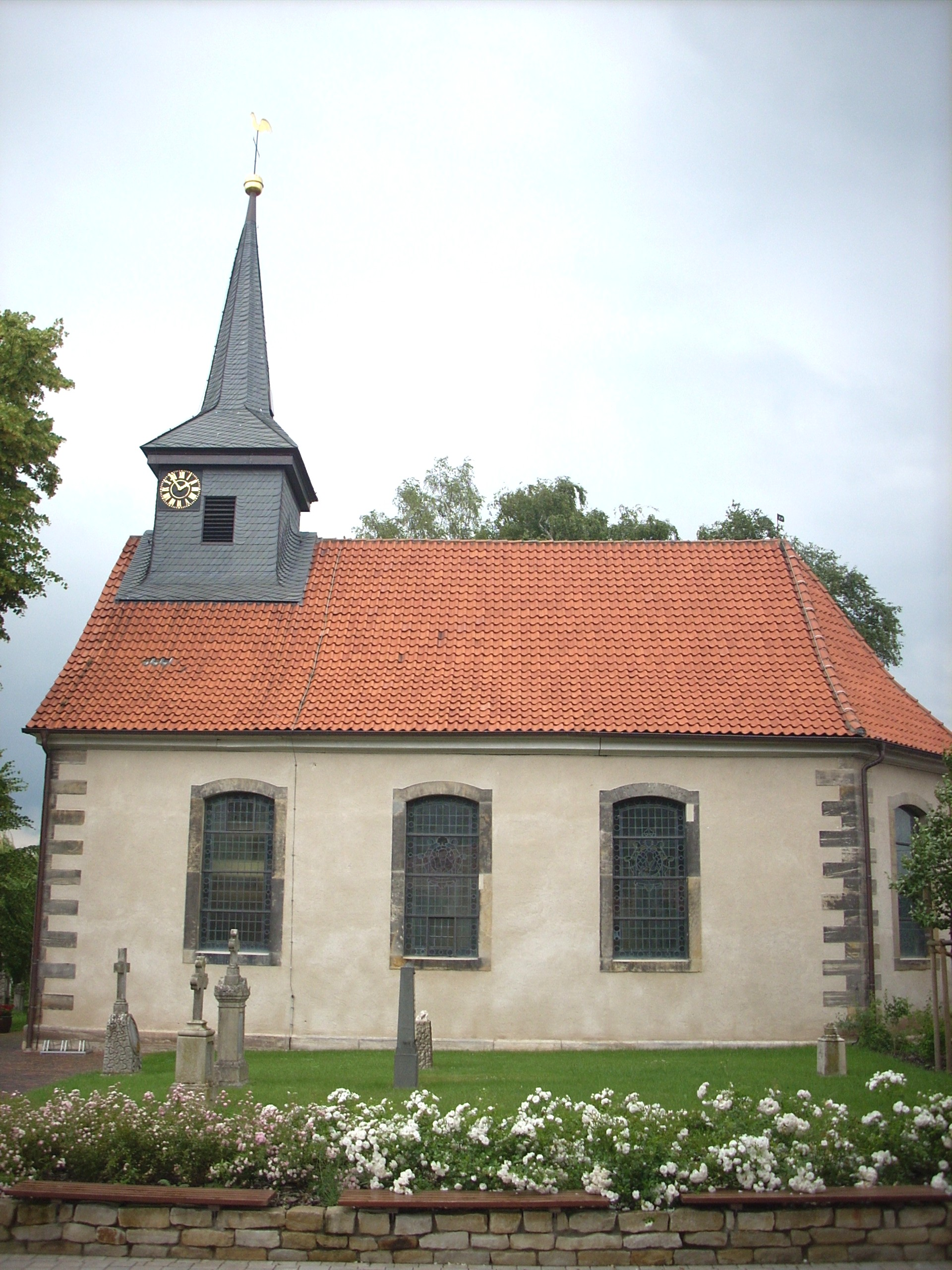 Ev. Kirche Wehmingen, Sehnde, Germany